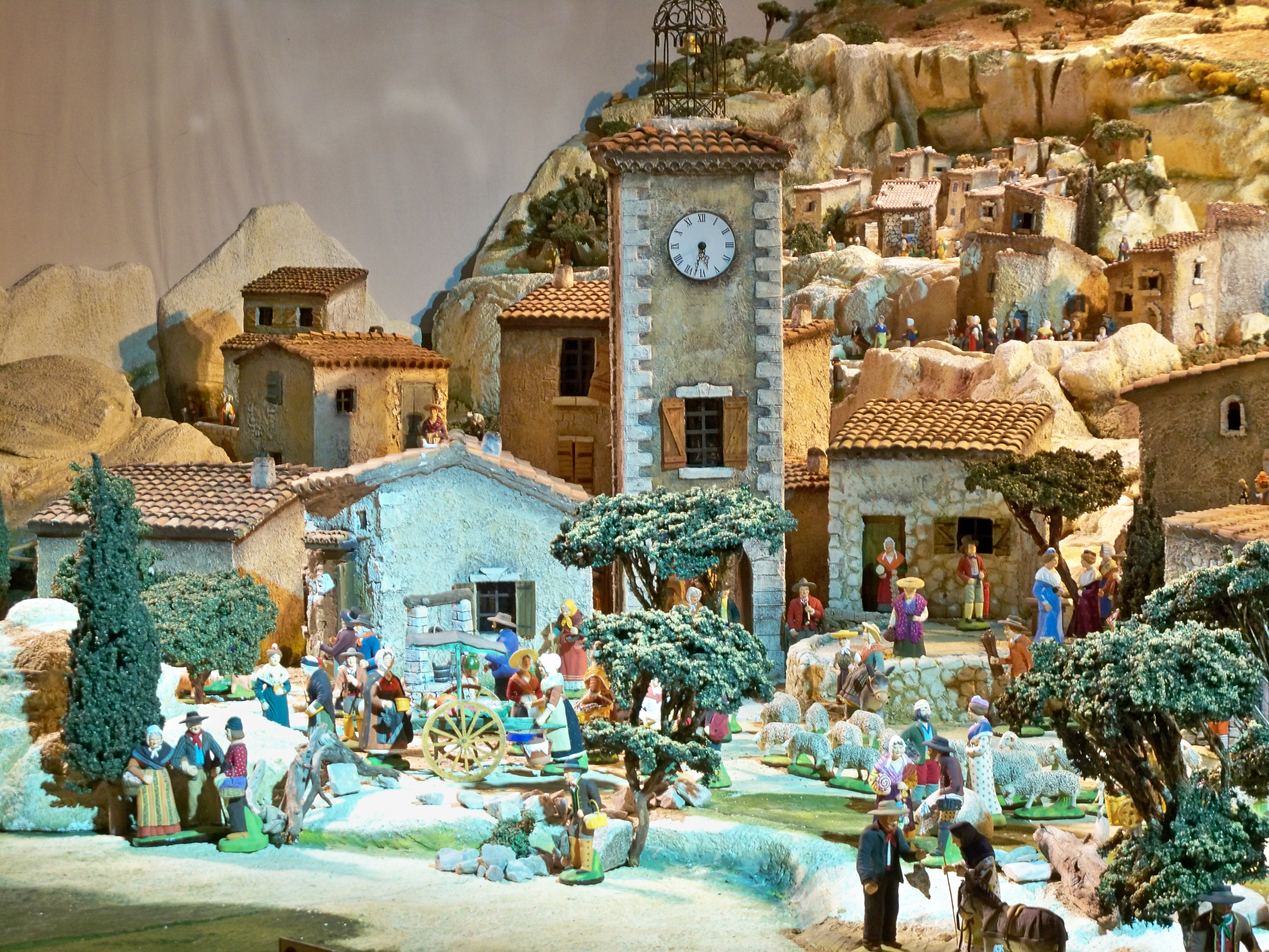 crèche de l'hotel de villa d'Avignon, Vaucluse, France, exécuté par les Ateliers Marcel Carbonel.